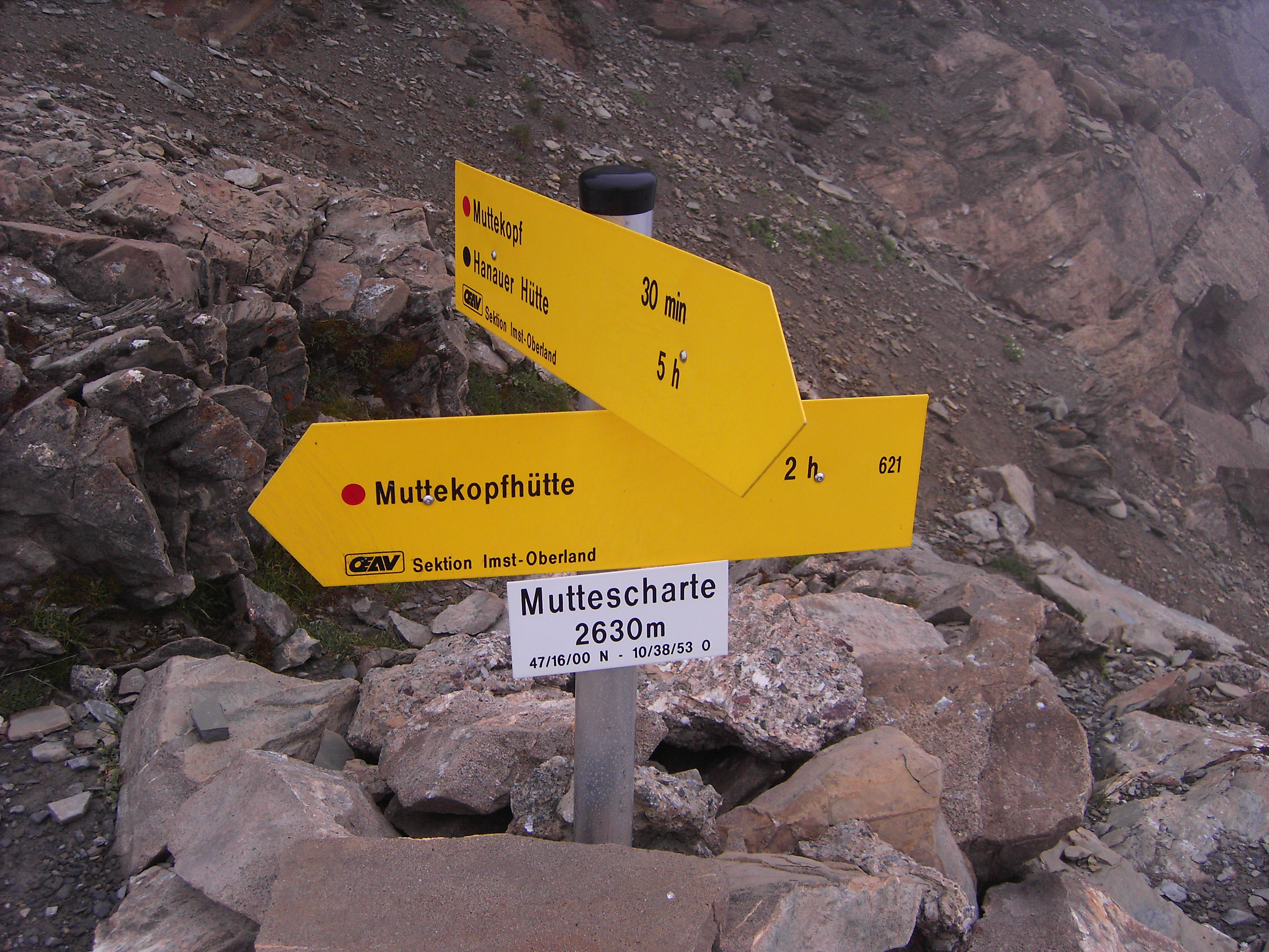 Wegweiser zum Muttekopf (Parzinn) und zur Muttekopfhütte